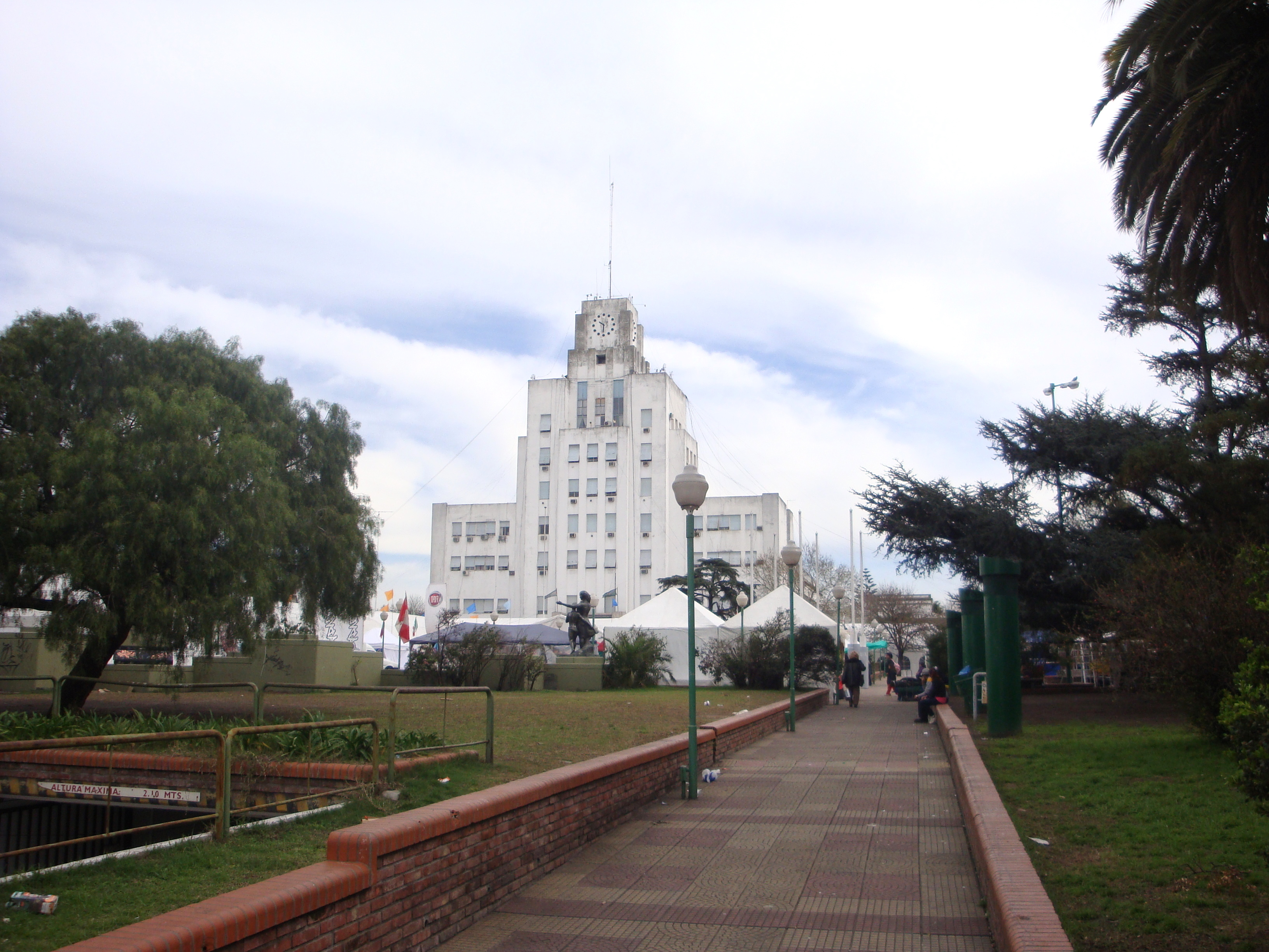 Municipalidad de Lomas de Zamora, emplazada detrás de la Plaza Tomás Grigera